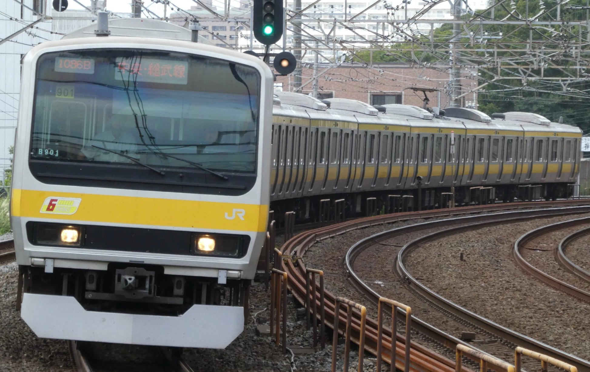 JR東日本E231系900番台ミツB901 中央・総武緩行線新検見川駅